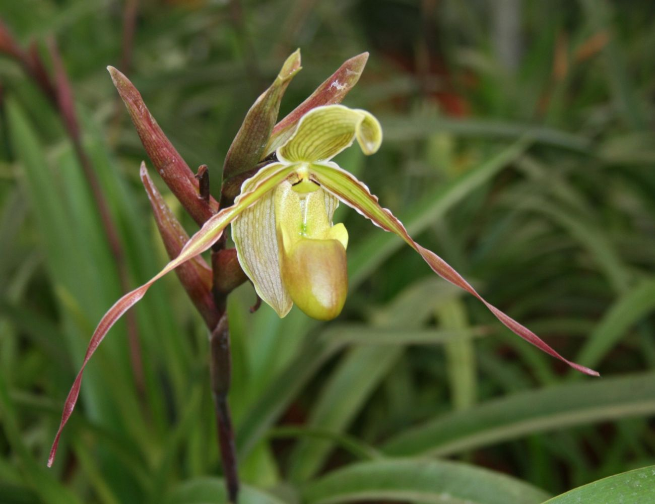 Phragmipedium longifolium, Orchideen (Orchidaceae) - Costa Rica: Prov. Cartago, Paraíso, Jardín Botánico Lankester/Lankester Botanical Garden, Orchid greenhouse